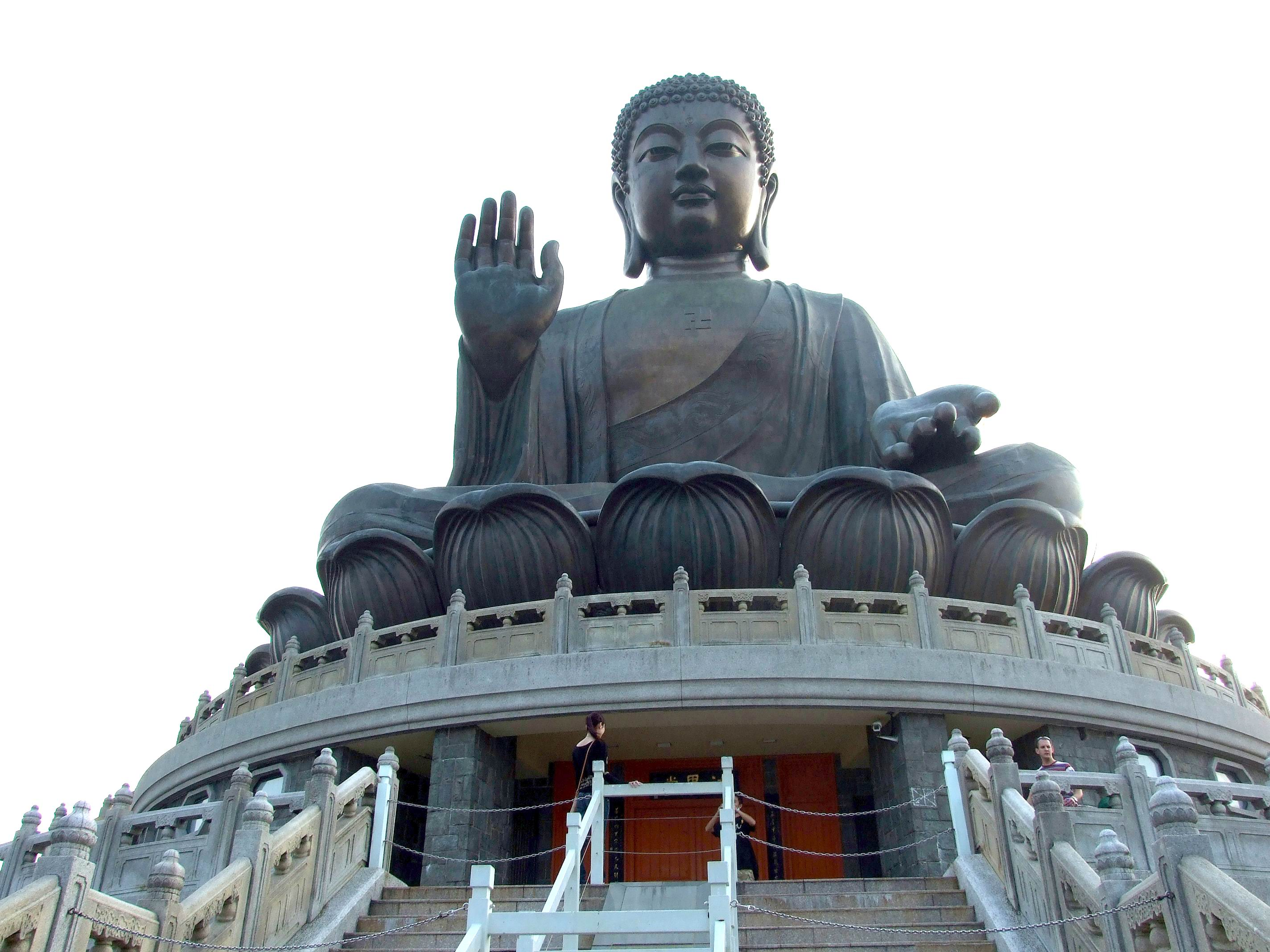 天壇大佛